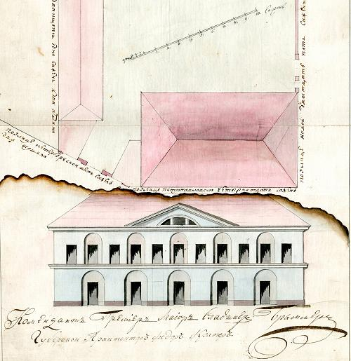 Дом купца I гильдии Филиппа Бекренёва в Петрозаводске (постр. 1791 г.). Архитектор Федор Крамер. Чертеж из фондов НА РК